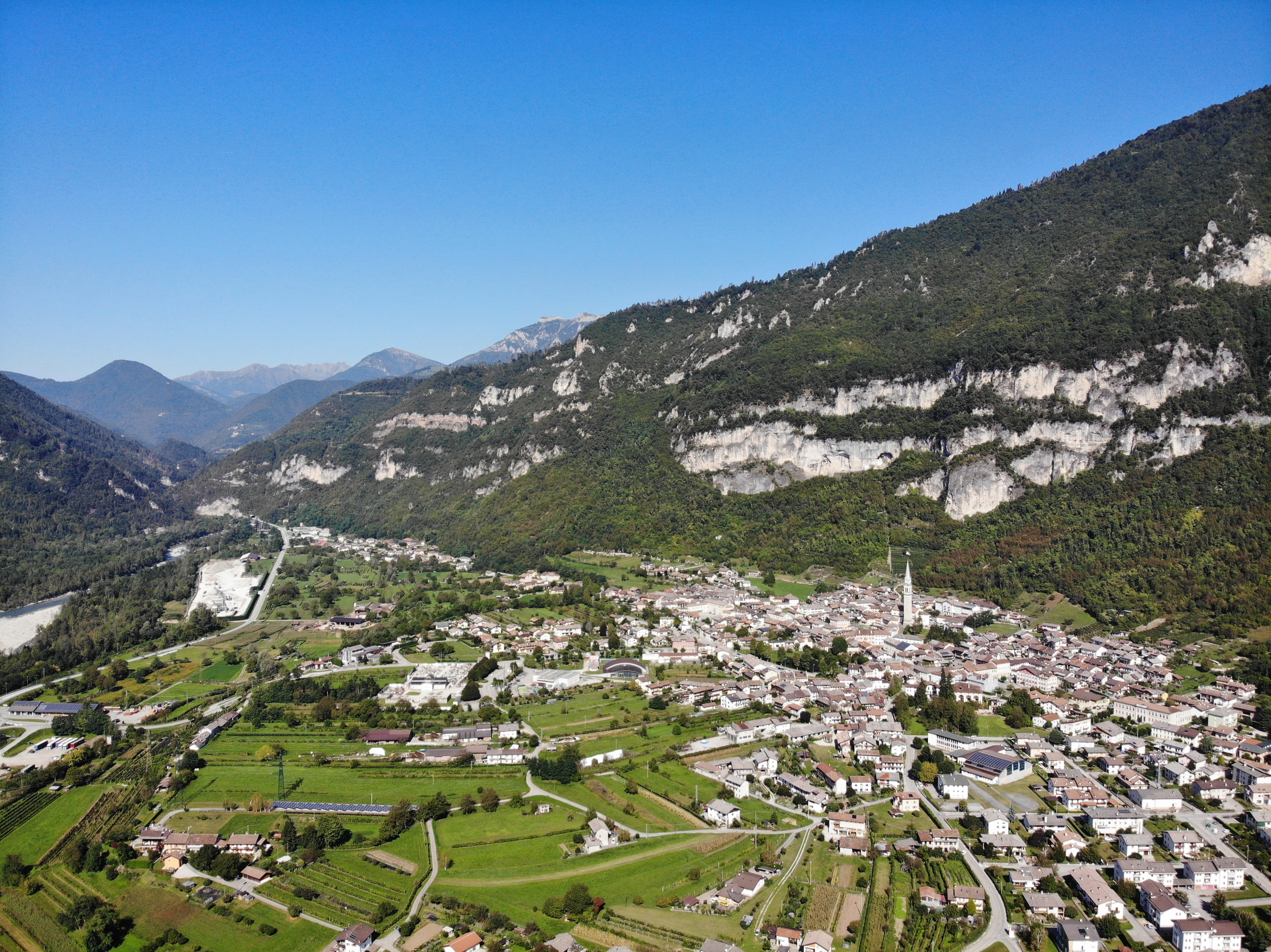 Visat aerea di una parte della piana di Fonzaso. Sulla sinistra si vedono la frazione di Frassenè e il torrente Cismon. Sulla destra il Monte Avena domina il paese. Sullo sfondo Si intravede il Monte Coppolo.